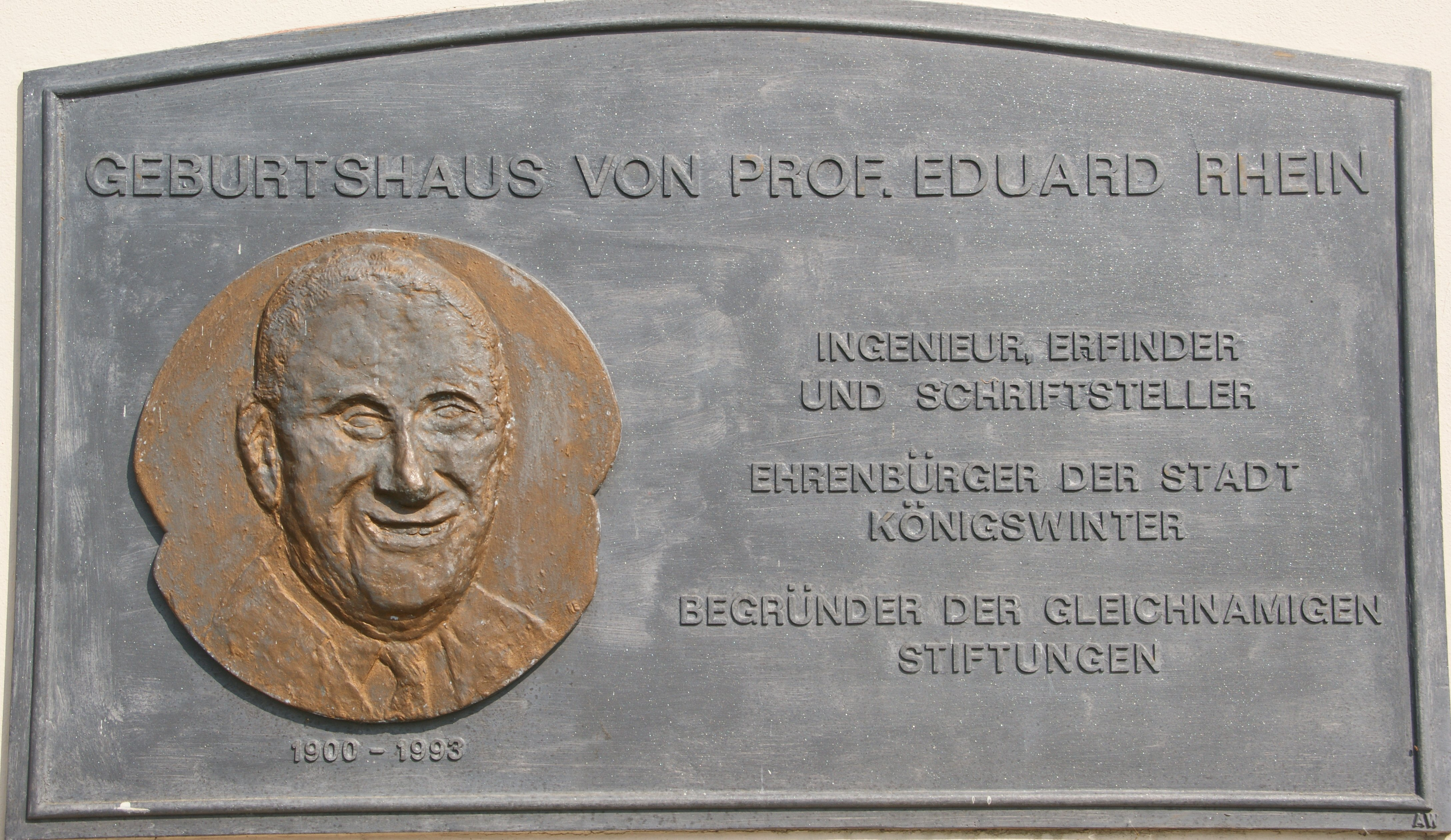 Gedenkplatte am Geburtshaus von Eduard Rhein in Königswinter